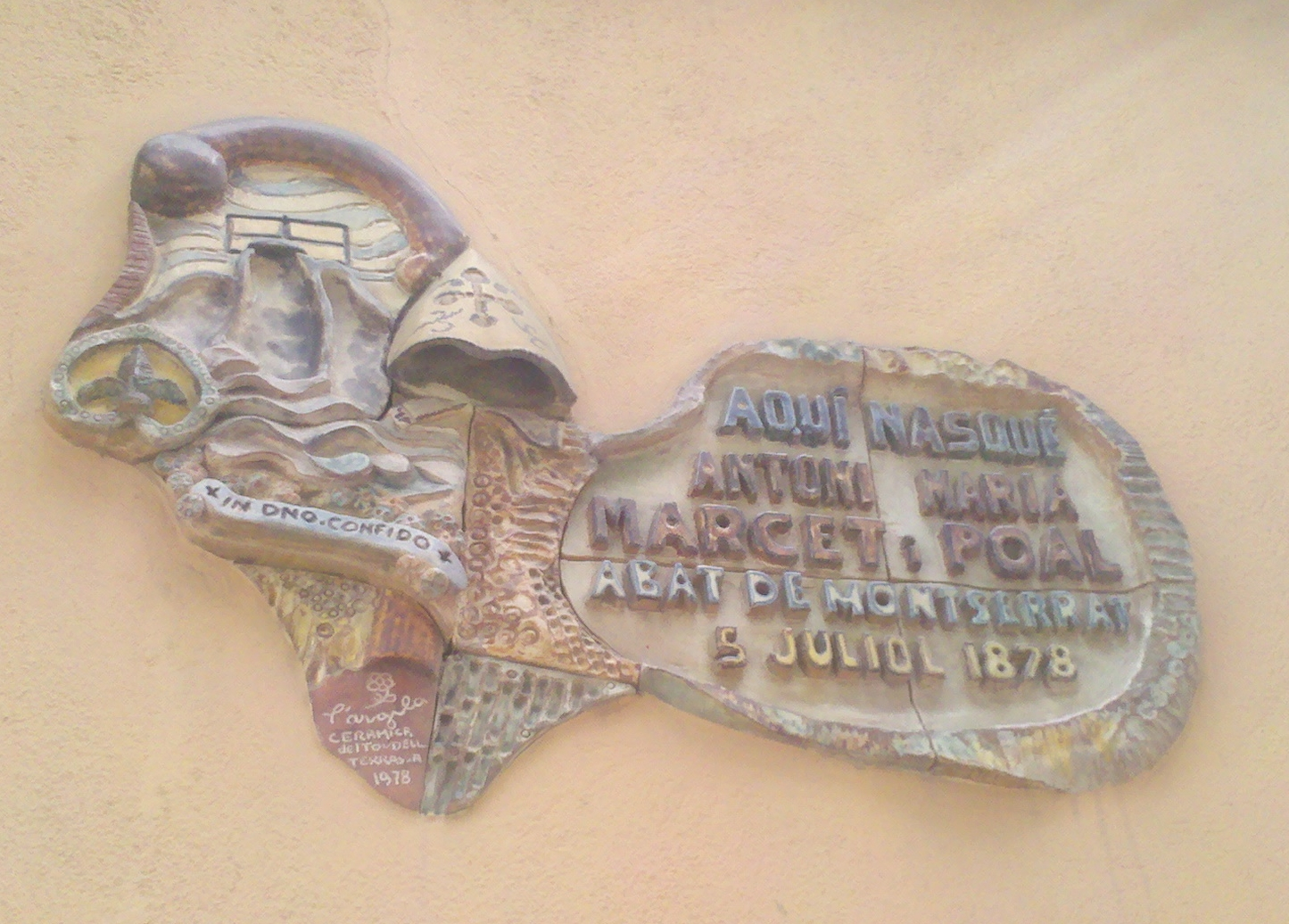 Placa a la casa natal del Rvdm. P. Abat de Montserrat Antoni M. Marcet i Poal (1878-1946). Al Carrer del Vall de Terrassa